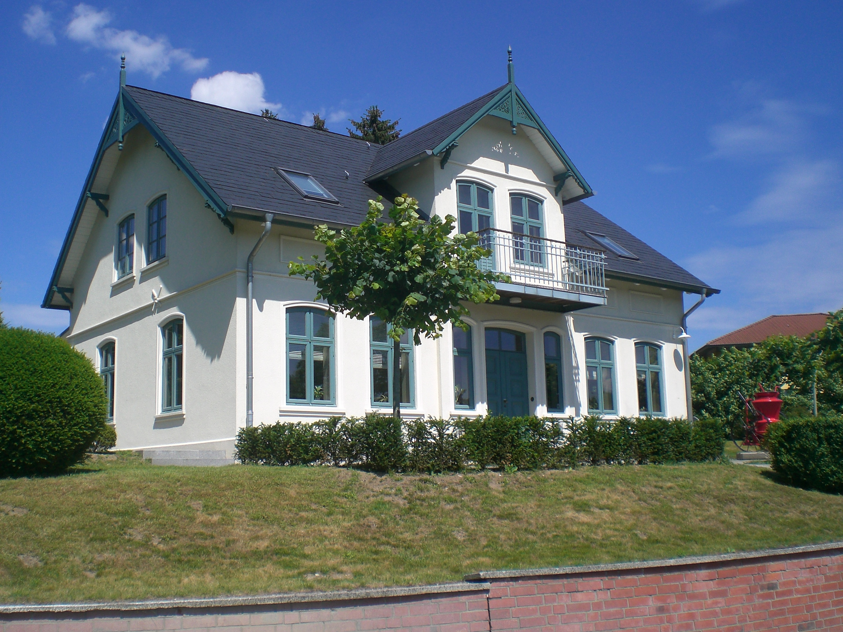 Villa Lichtwark, Specksaalredder 2, Hamburg-DuvenstedtThis is a photograph of an architectural monument.